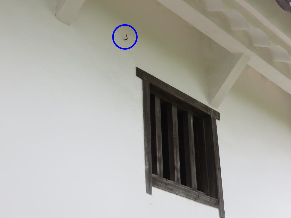 姫路城、西の丸渡櫓。青丸内は太平洋戦争中に城を守るため黒い網（偽装網）を掛けた鉤金具。